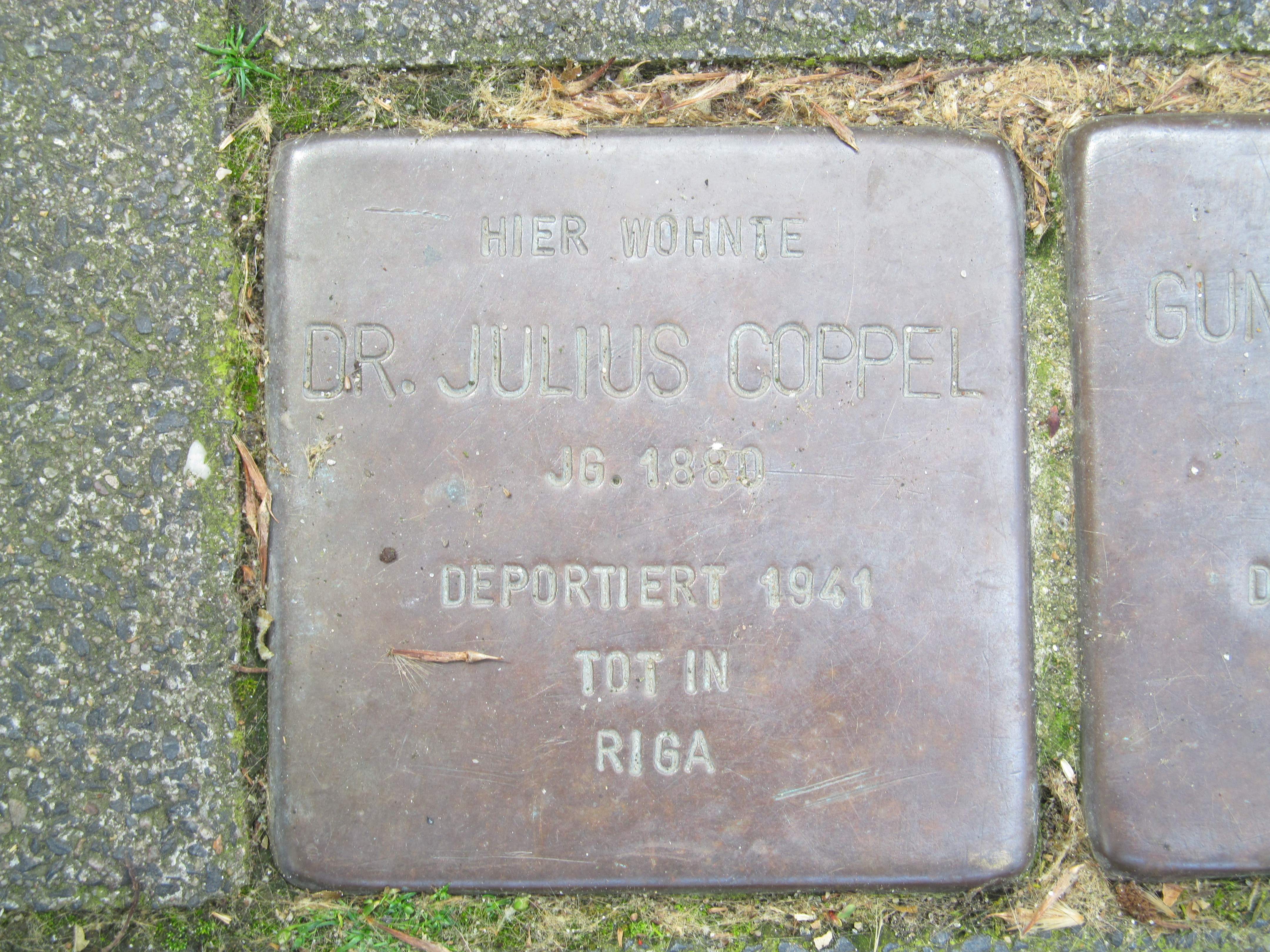 der Stolperstein für Dr. Julius Coppel vor dem Haus Rheinstraße 27 in Duisburg-Homberg